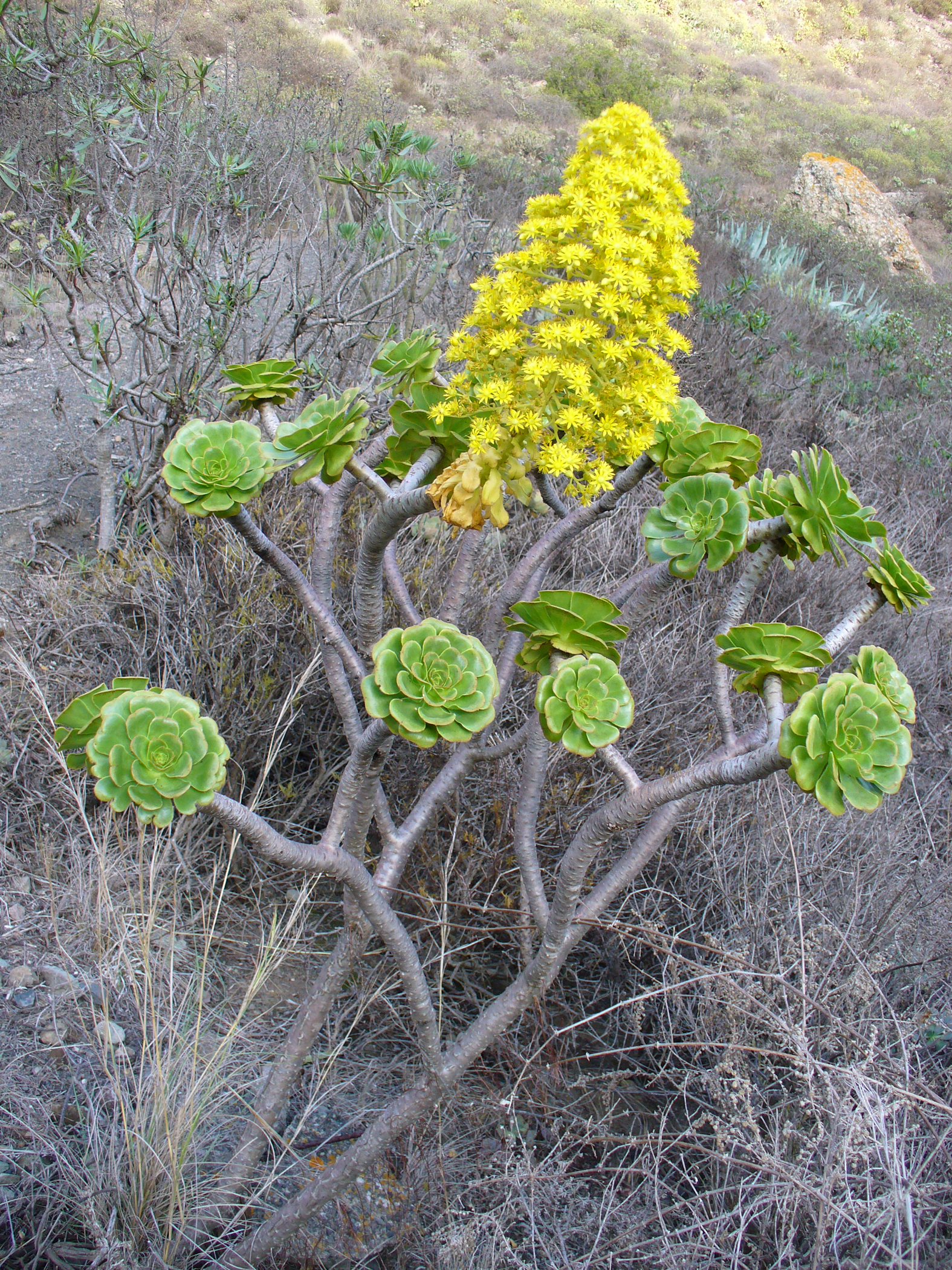 Aeonium manriqueorum el floración